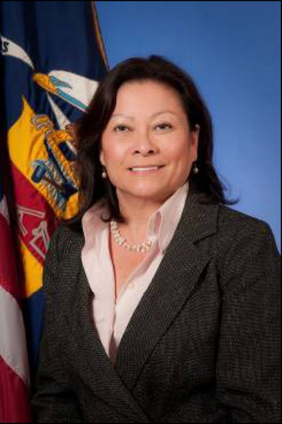 Patricia A. Shiu